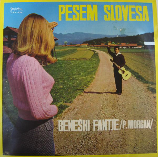 Beneški fantje - Pesem slovesa.